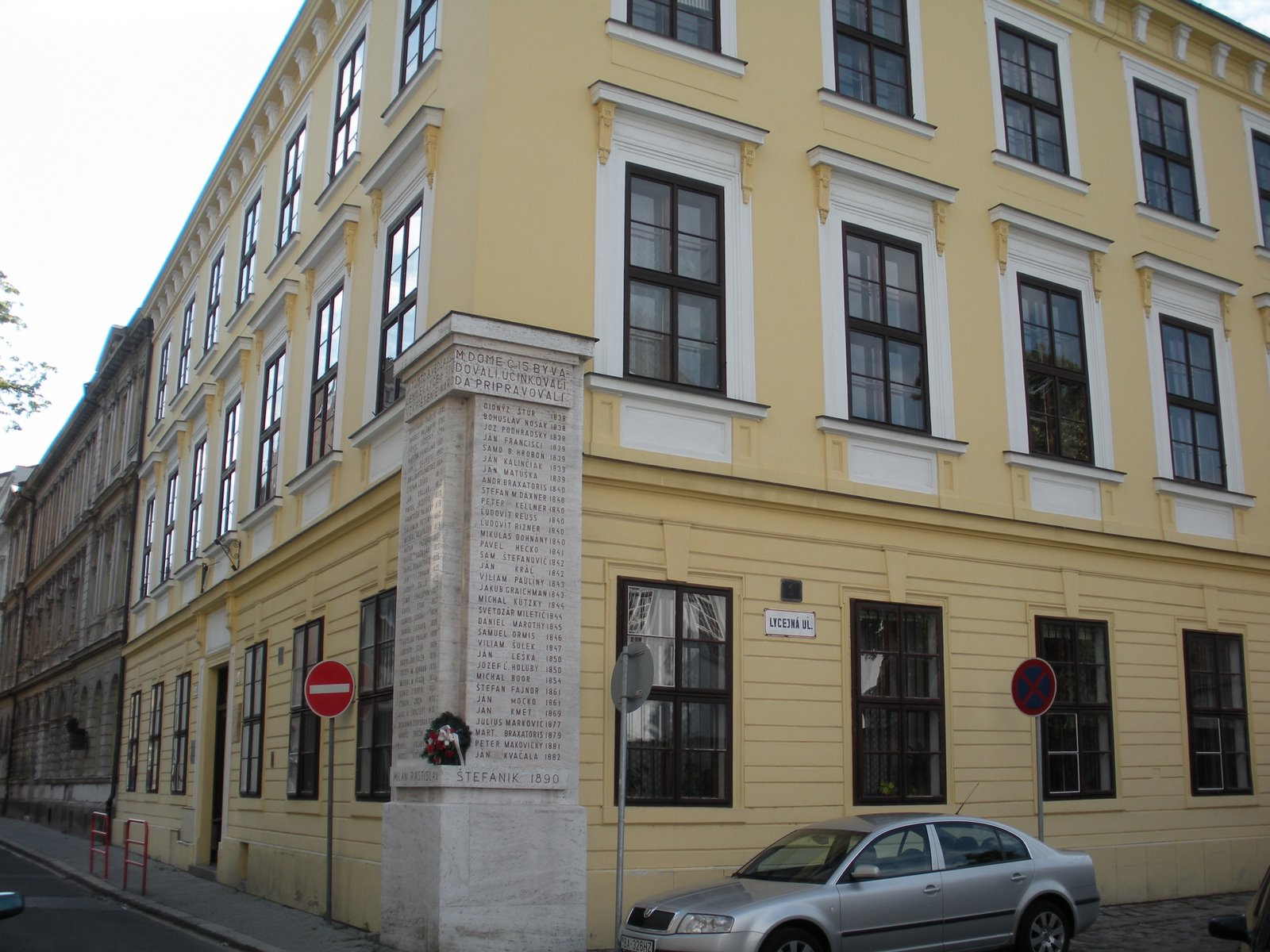 Budova Ústavu slovenskej literatúry SAV na Konventnej ulici v Bratislave